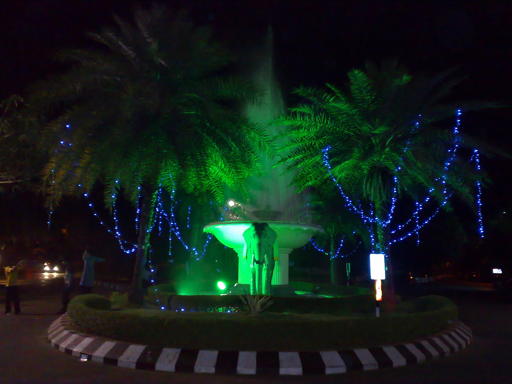 A night view of Gajendra Circle, IIT Madras